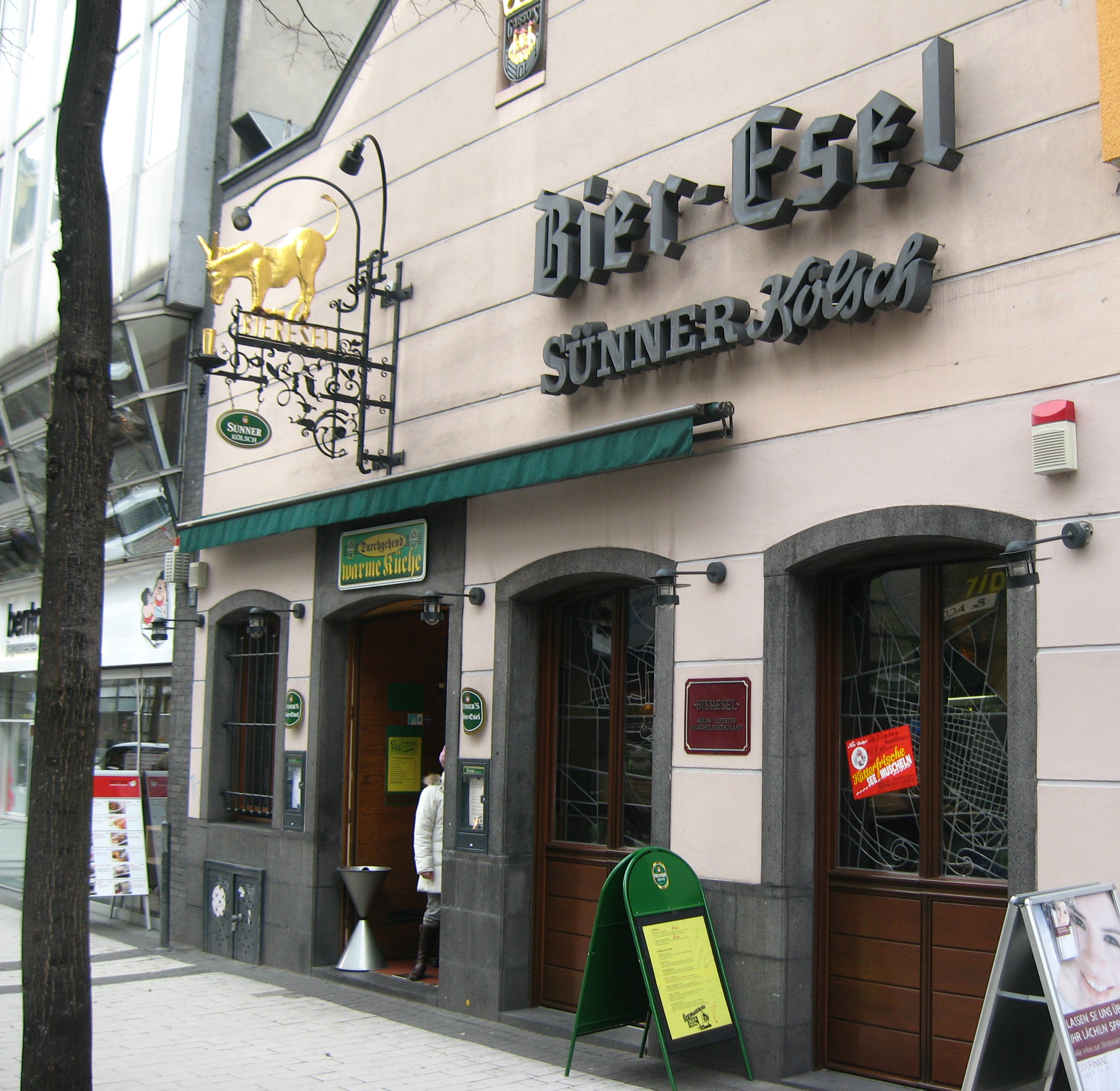 Kölns ältestest Muschelhaus "Bieresel" (Gaststätte seit 1297) Datum: 21.01.2011 Urheber: B. Neulich alias Benutzer:Neulich im Roxy Kino Quelle: Privates Fotoarchiv des Urhebers